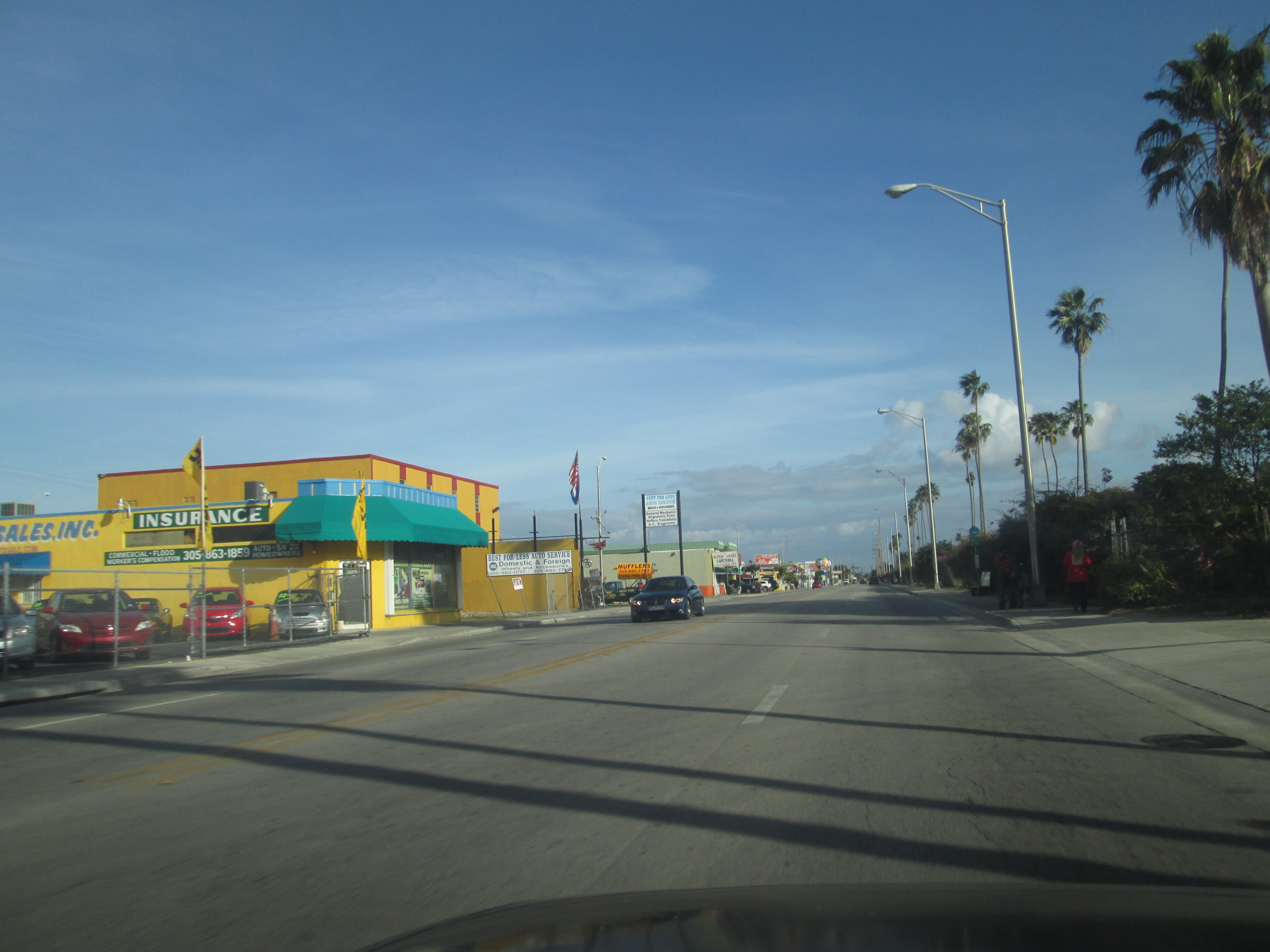 Palm Ave-Hialeah